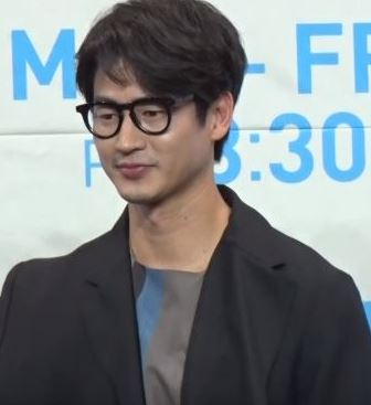 KBS 1TV 일일연속극 '여름아 부탁해' 제작발표회가 25일 오후 라마다 서울 신도림 그랜드볼룸에서 열렸다.